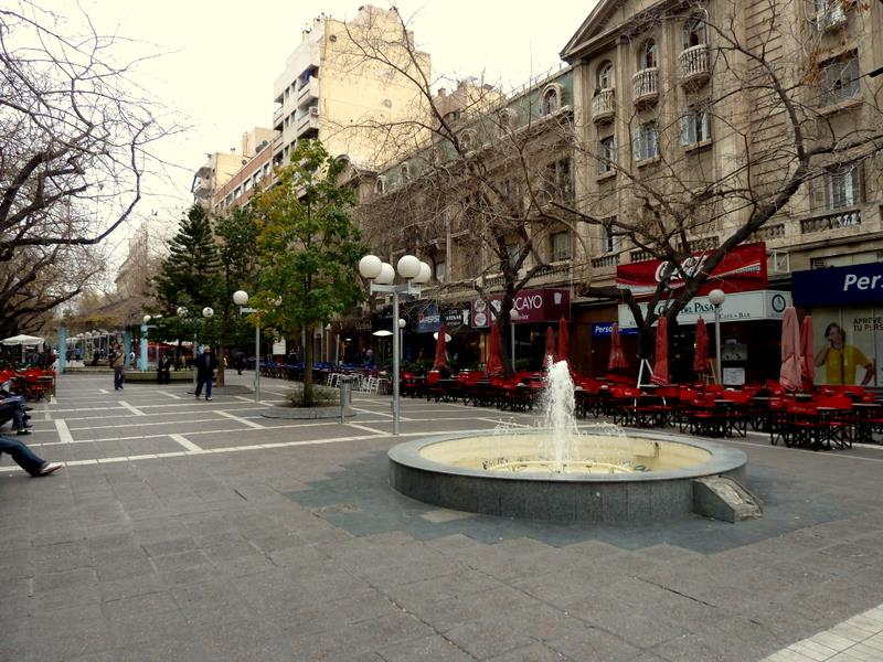 Sarmiento Promenade, Mendoza, Argentina.